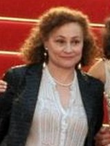 Catherine Arditi au festival de Cannes 2012